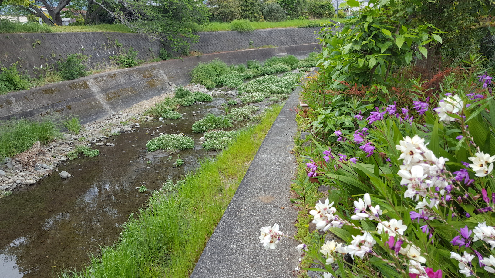 山原川中流（2020/5/3）